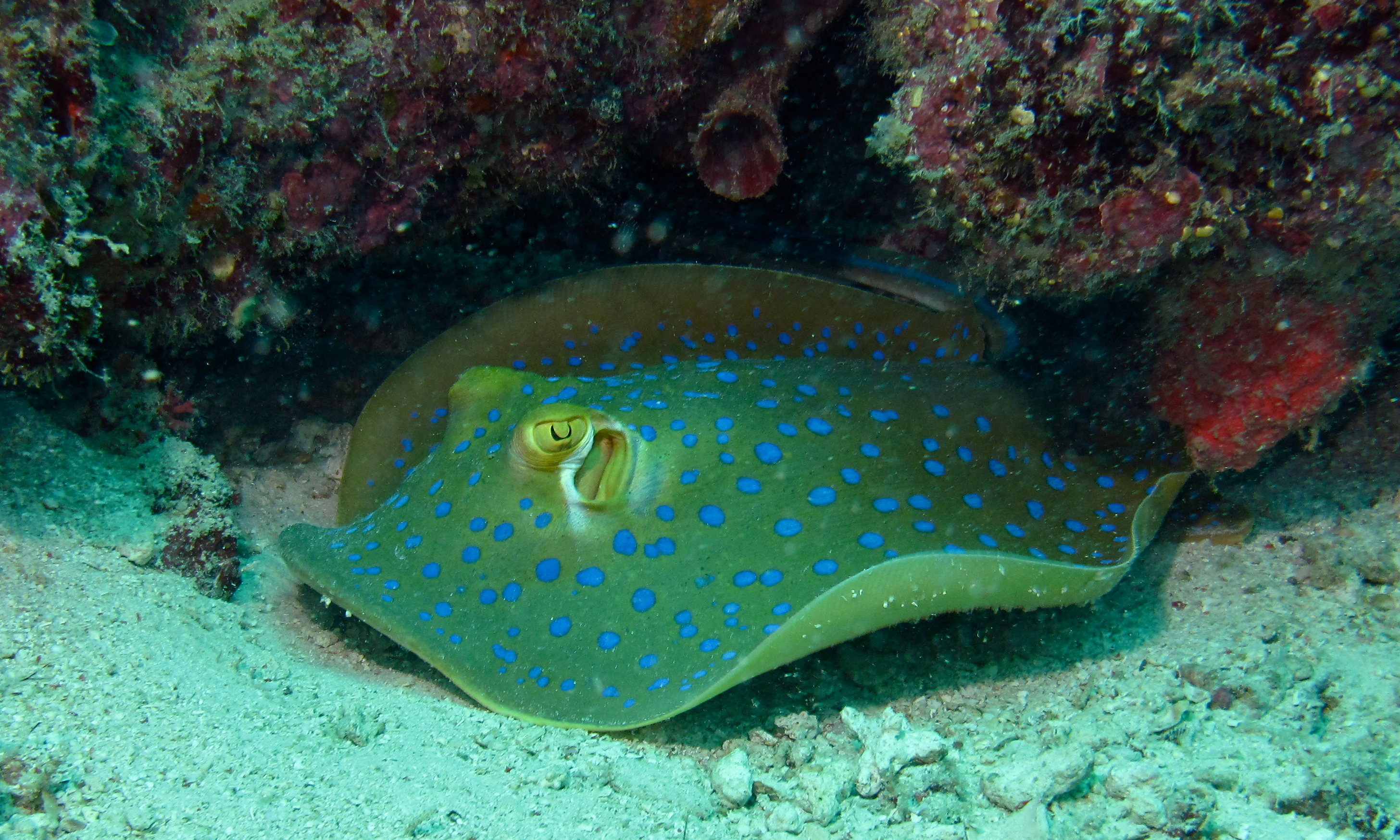 Stingray City, Mabul, Sabah, MALAYSIA